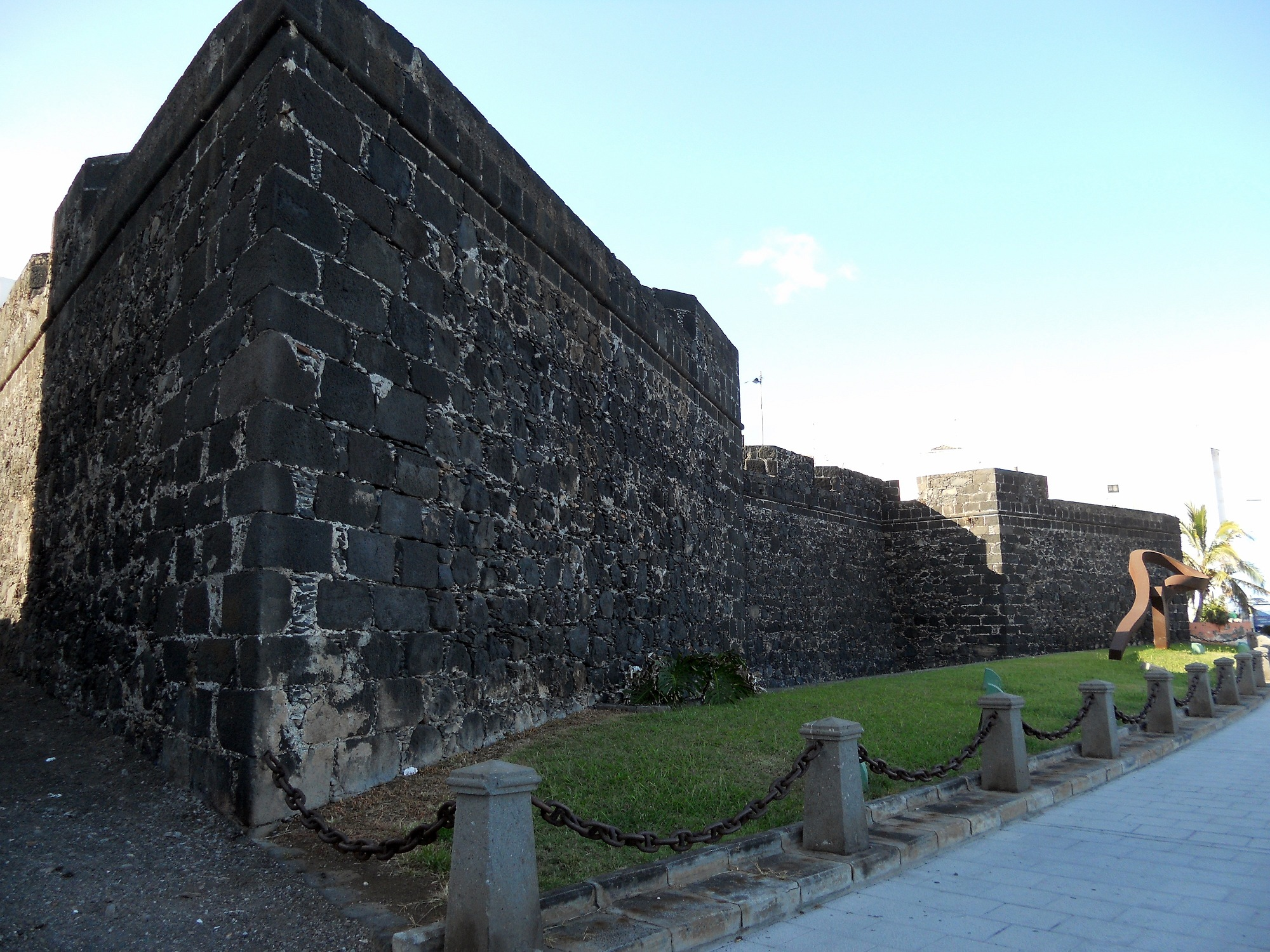 Angolo est del Castillo de Santa Catalina in Santa Cruz de La Palma.